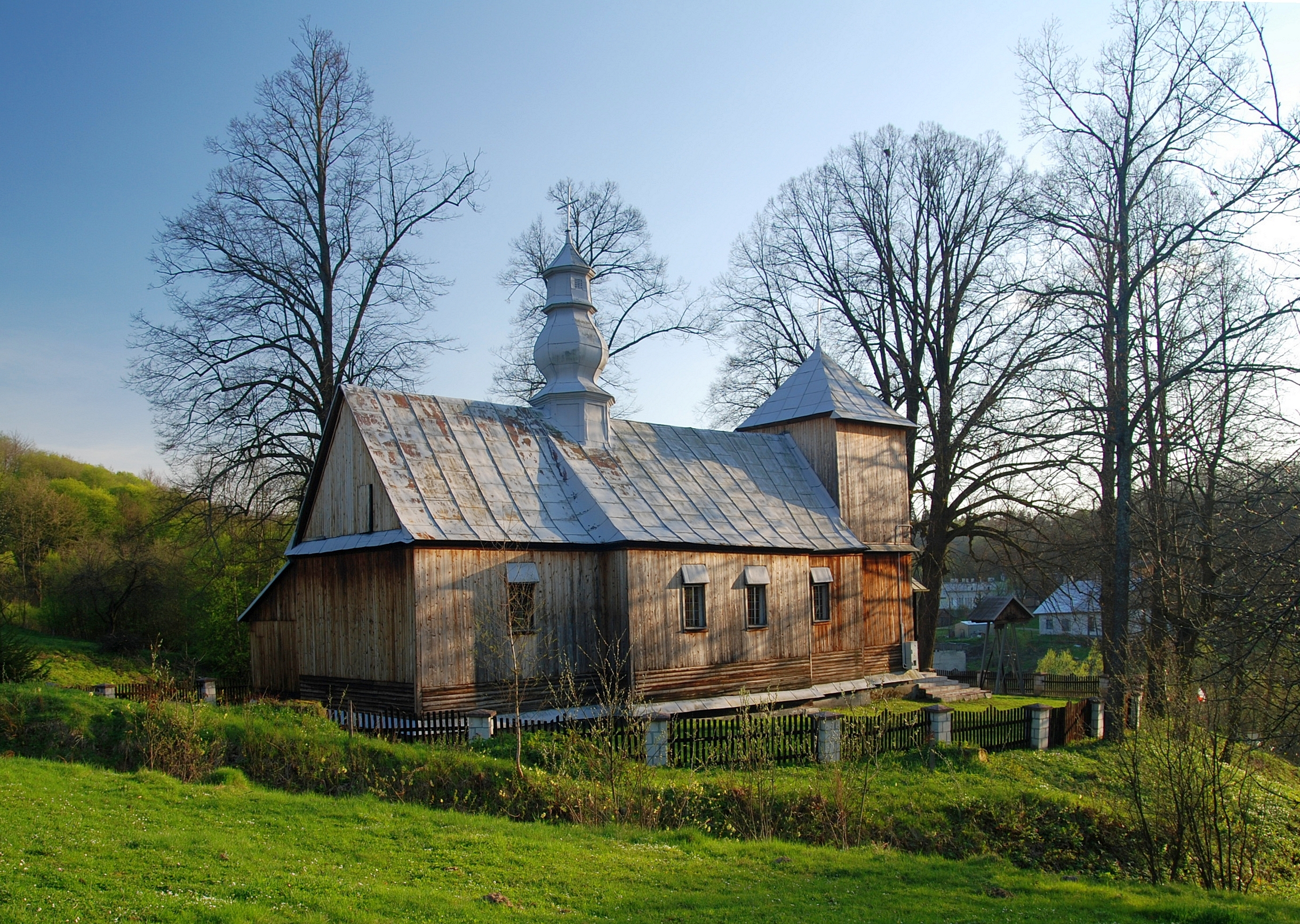 wieś Rudenka